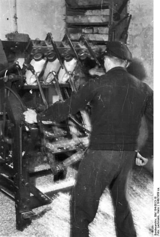 Holzpantinenmacher, Holtwick (bei Bocholt)